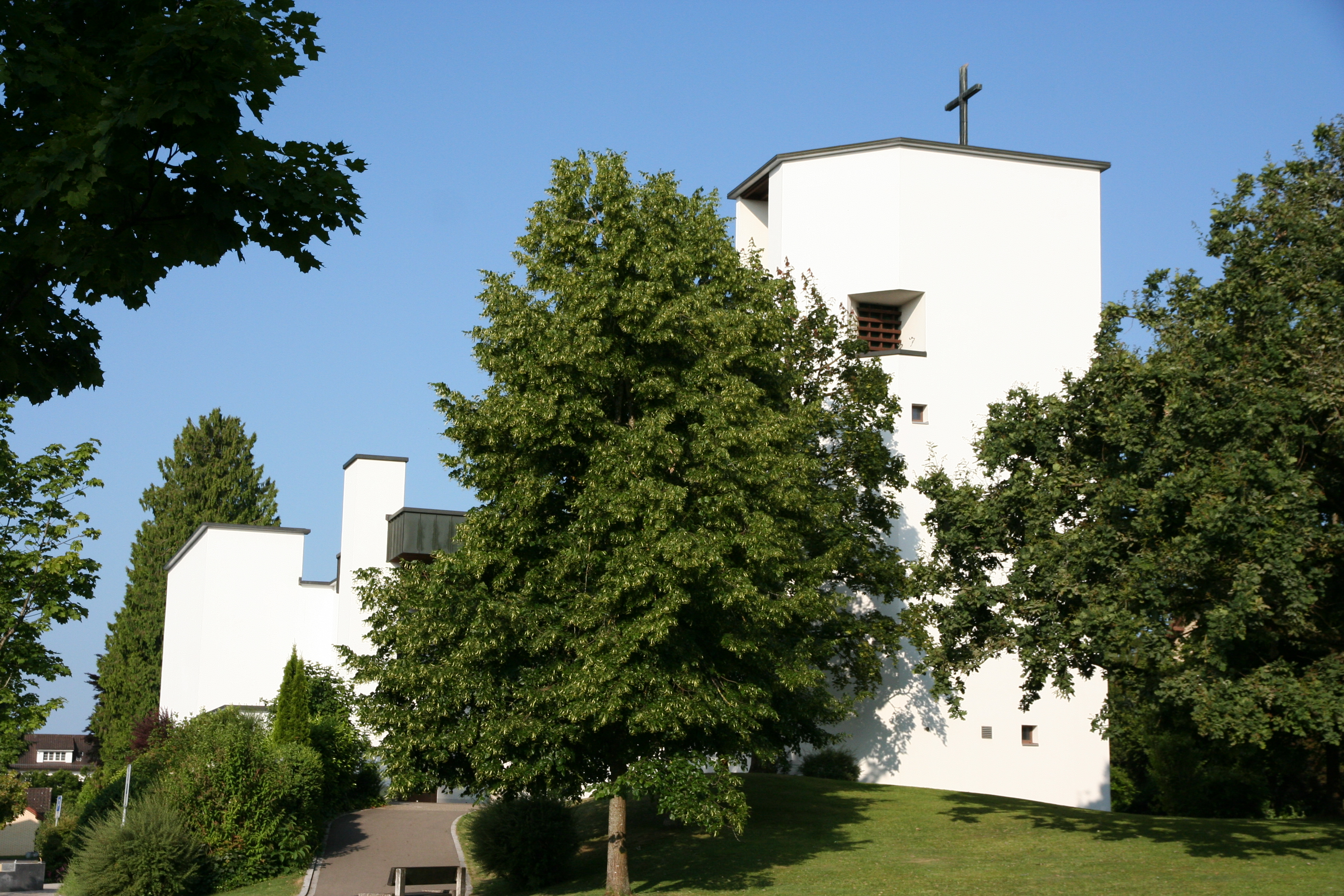 Römisch-katholische Pfarrikirche St. Niklaus Hombrechtikon, Aussenansicht von Osten im Sommer